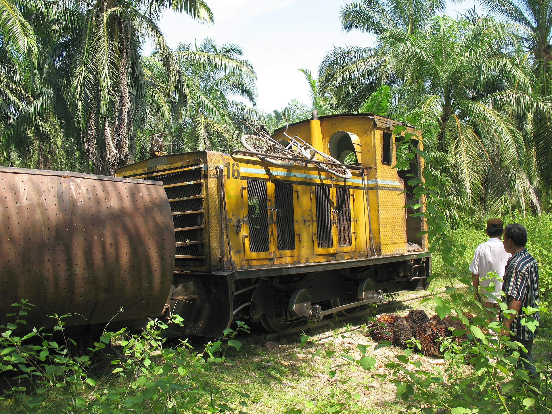 Sawit Seberang, 31.07.2008